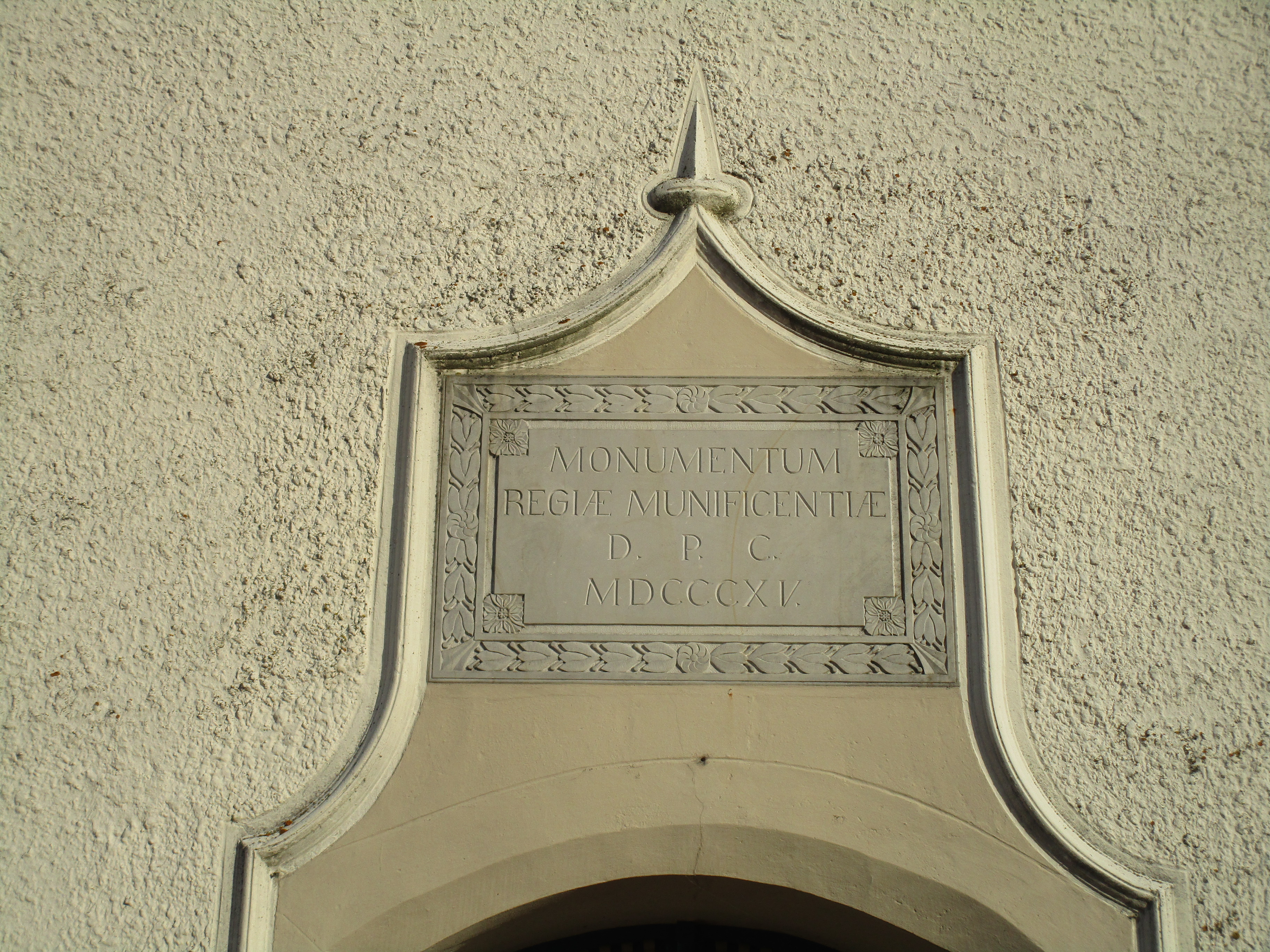 Die Sankt Matthäuskirche in Hunteburg ... Object location52° 26′ 16.43″ N, 8° 16′ 34.29″ E